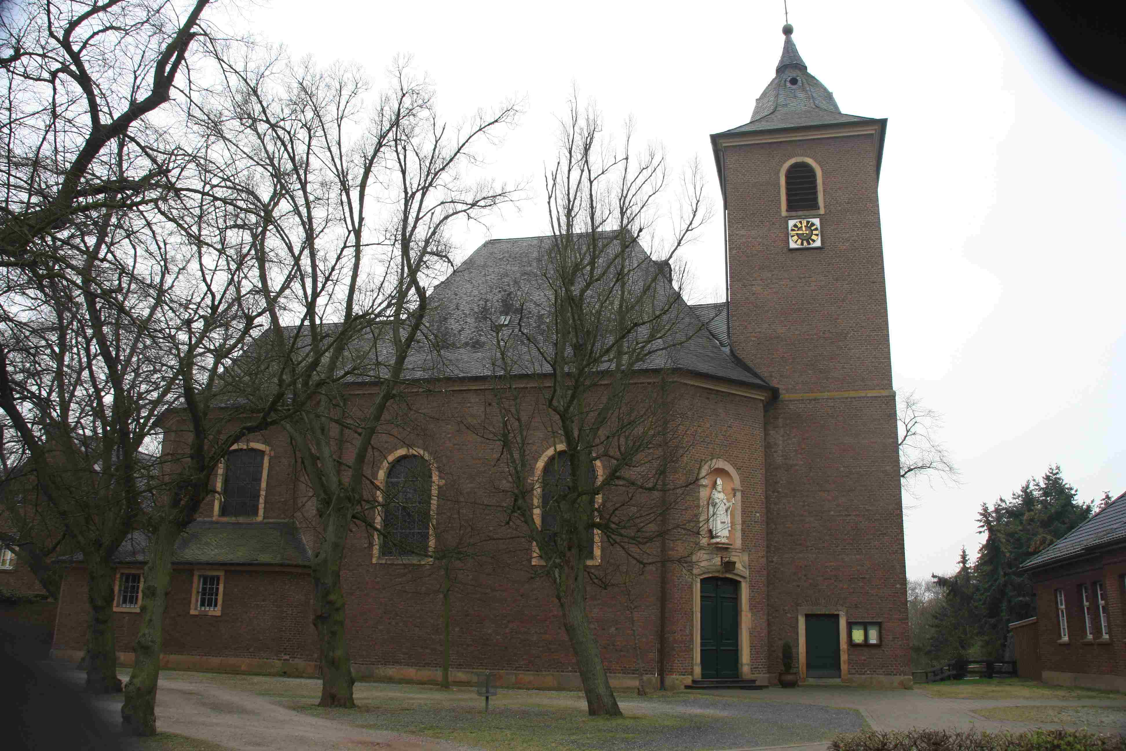 Die Pfarrkirche St. Amandus in Müddersheim, Gemeinde Vettweiß